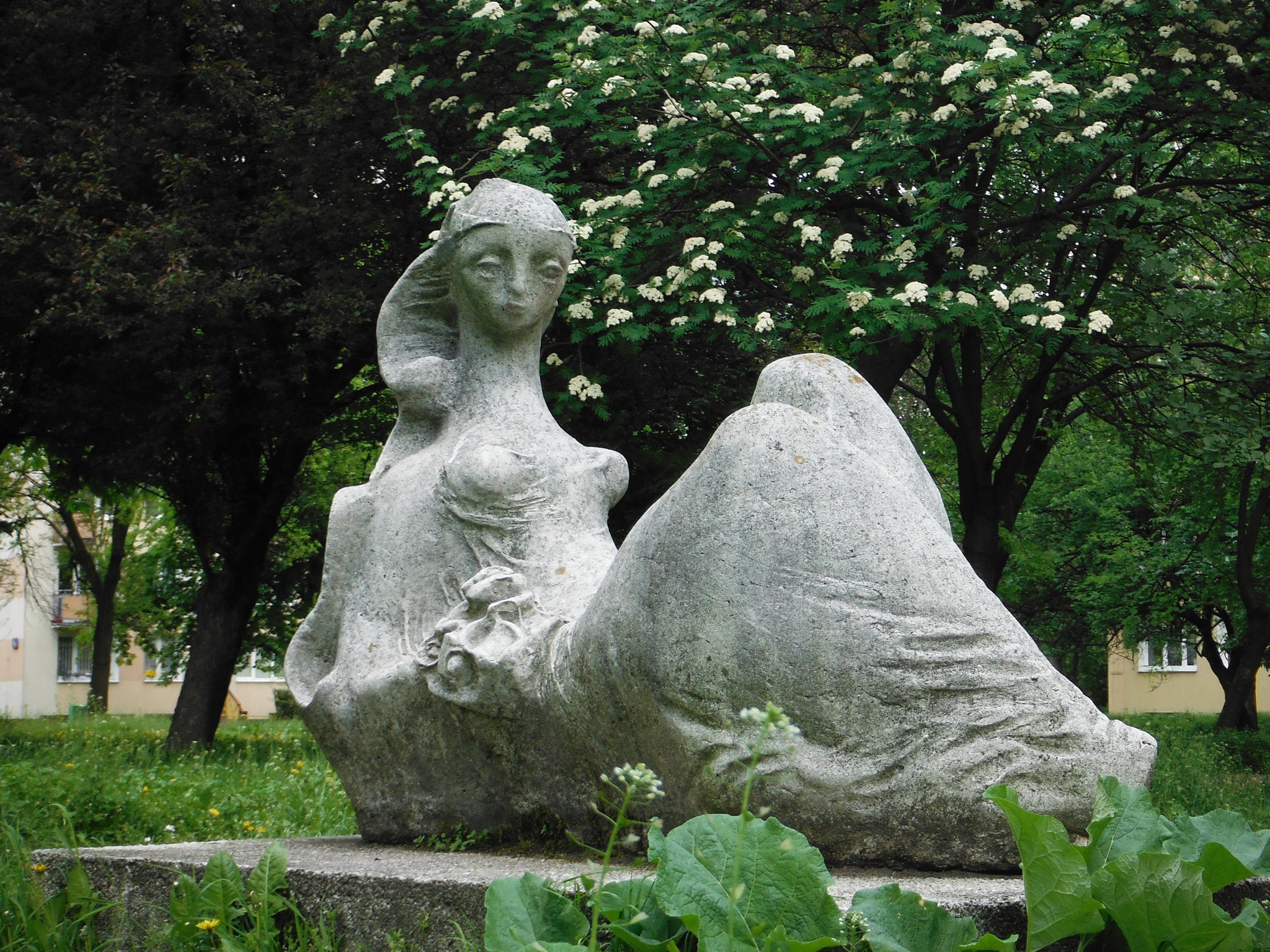 "Wiosna" autorstwa Teresy Brzóskiewicz - jedna z rzeźb plenerowych przy ul. Międzynarodowej w Warszawie.